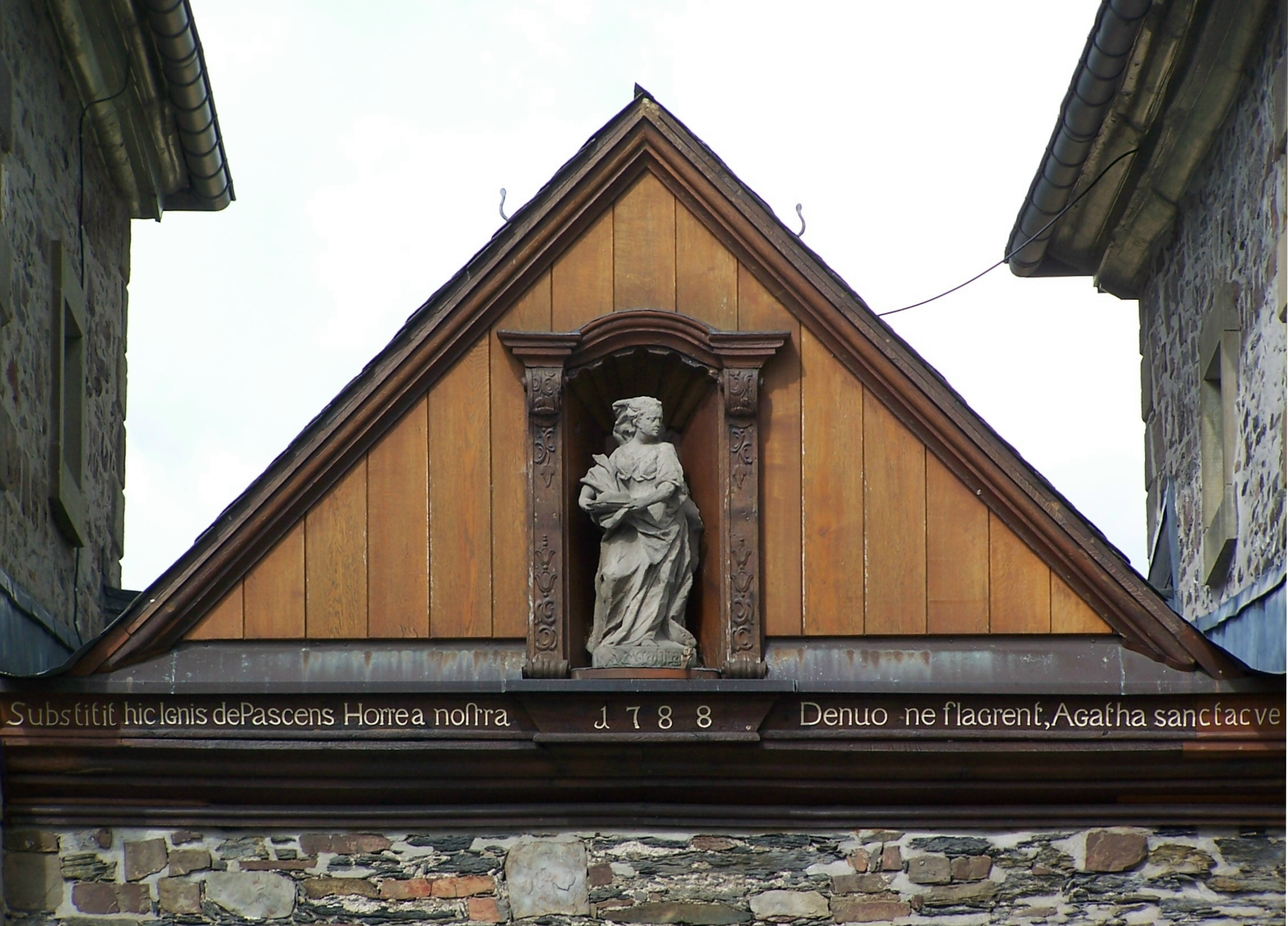 Kloster Grafschaft, Torhaus